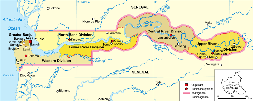 Politische Karte Gambias